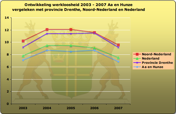 Werkloosheid in Aa en Hunze in de periode 2003 t/m 2007 vergeleken met prov. Drenthe, Noord-Nederland en Nederland